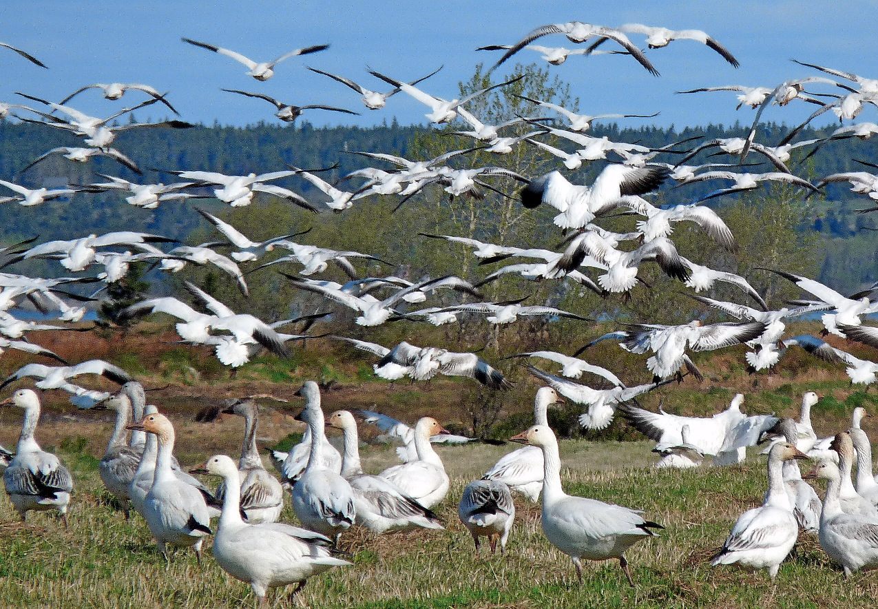 Oies blanches sur la réserve nationale de faune de la Baie-de-L'Isle-Verte, au Bas-Saint-Laurent (Québec)